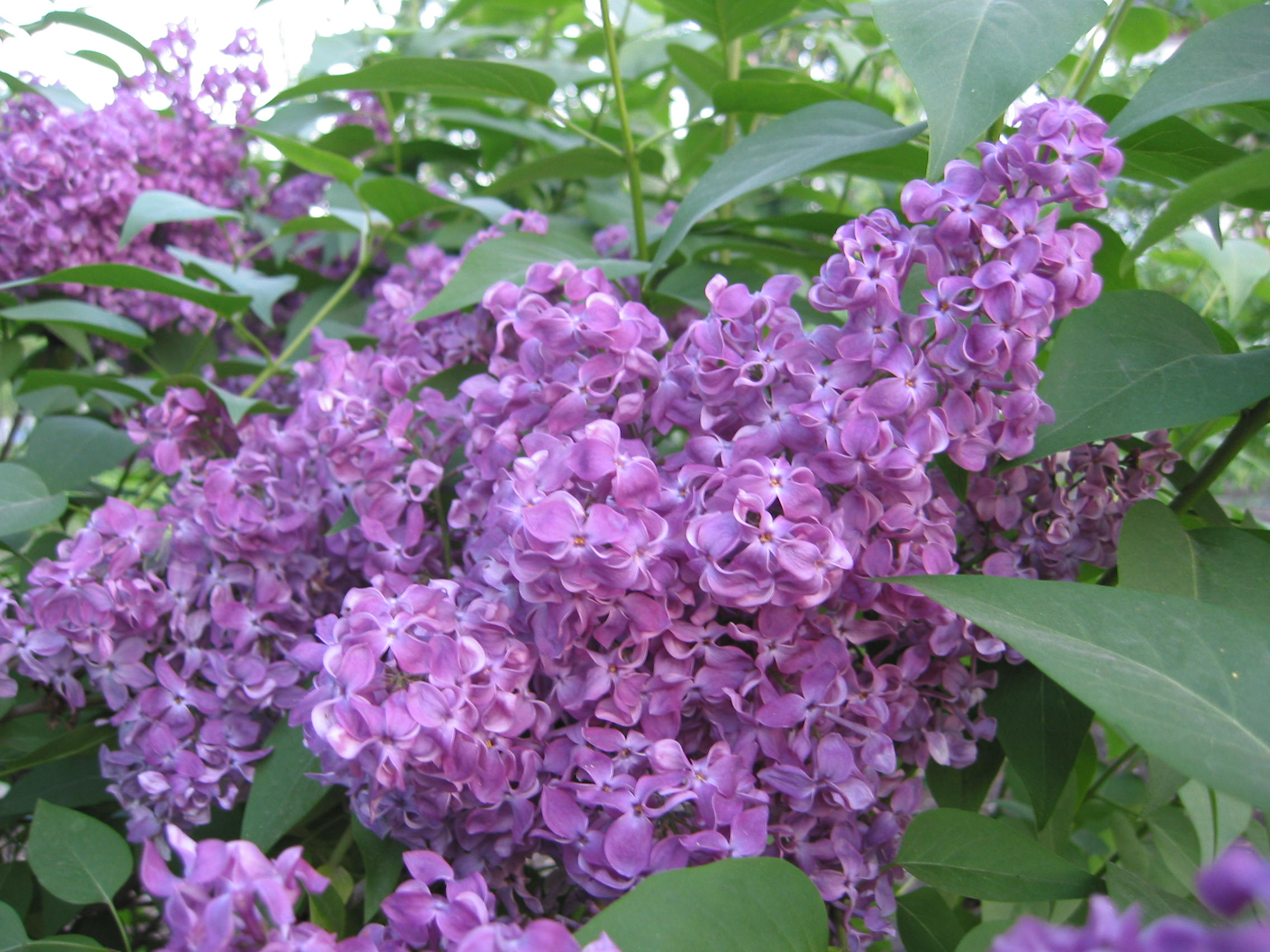 Растение